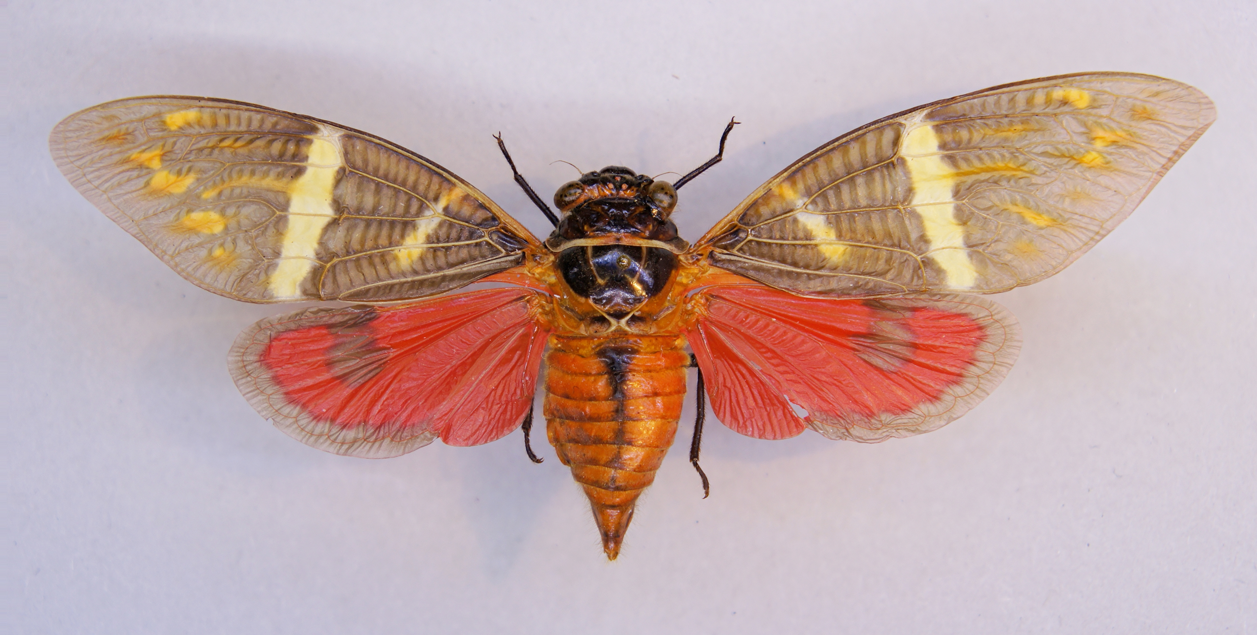 Gaeana atkinsoni (Distant, 1889) Herkunft:Indien, West-Gaths, Trivandrum